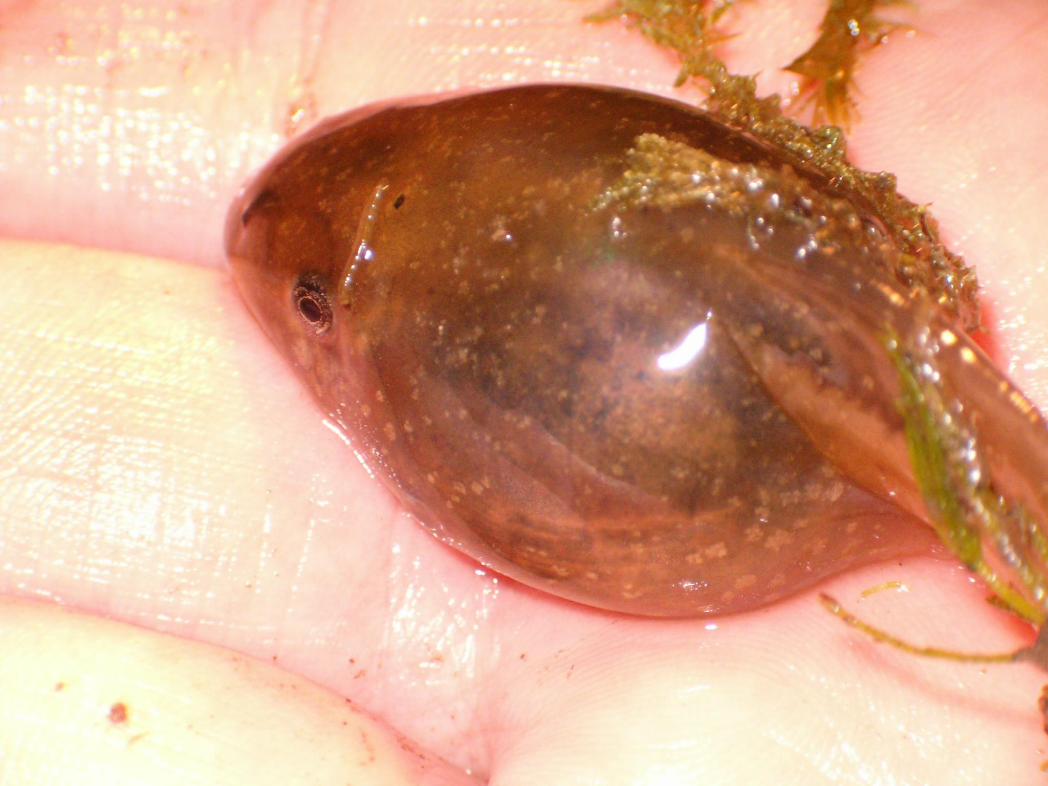 Young Pelobates cultripes 24 March 2006 - 23h30 Notre-Dame-de-Londres - Hérault - France By David Delon